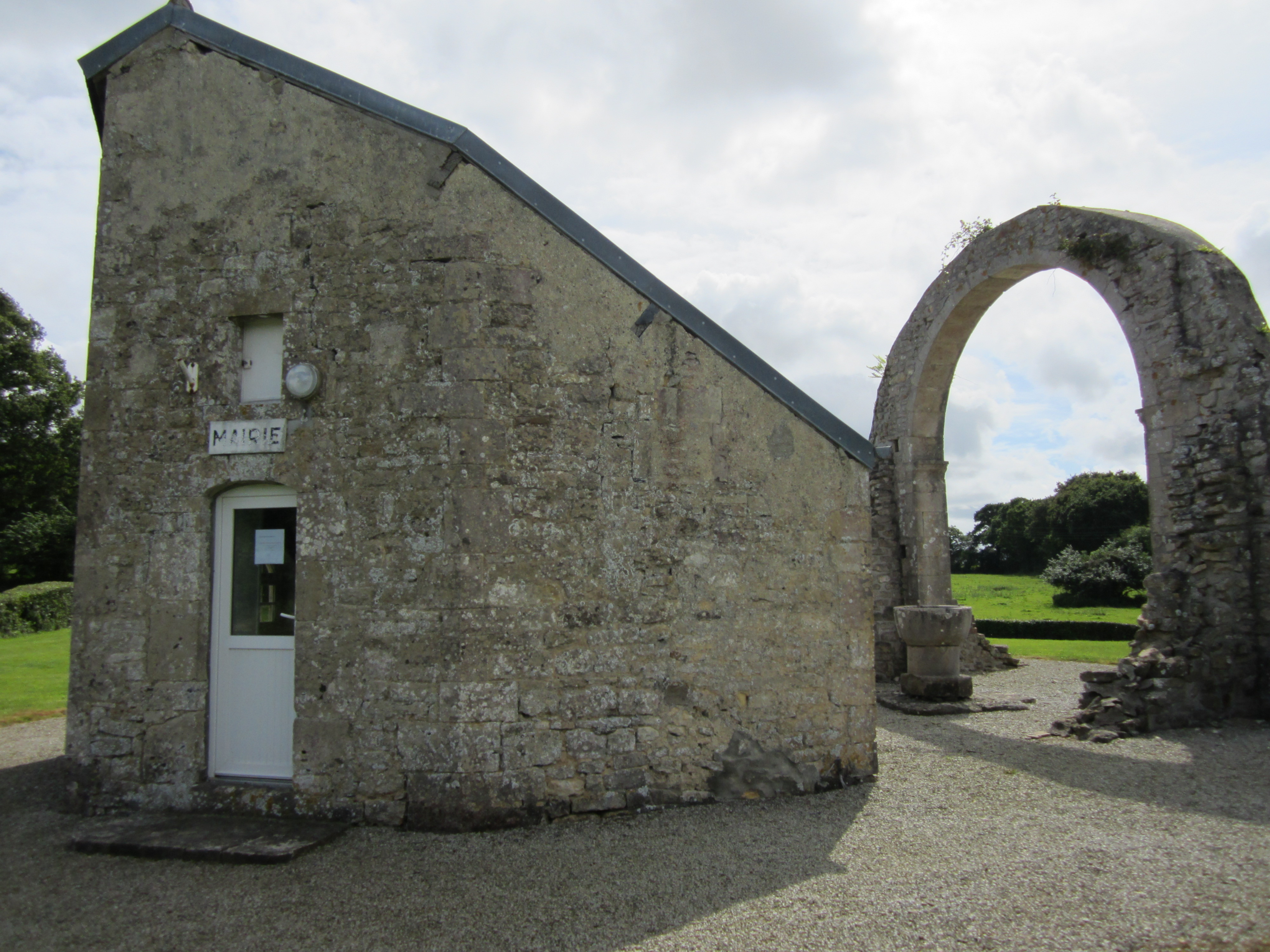 ancienne église de Reigneville-Bocage, dont la sacristie sert de mairie